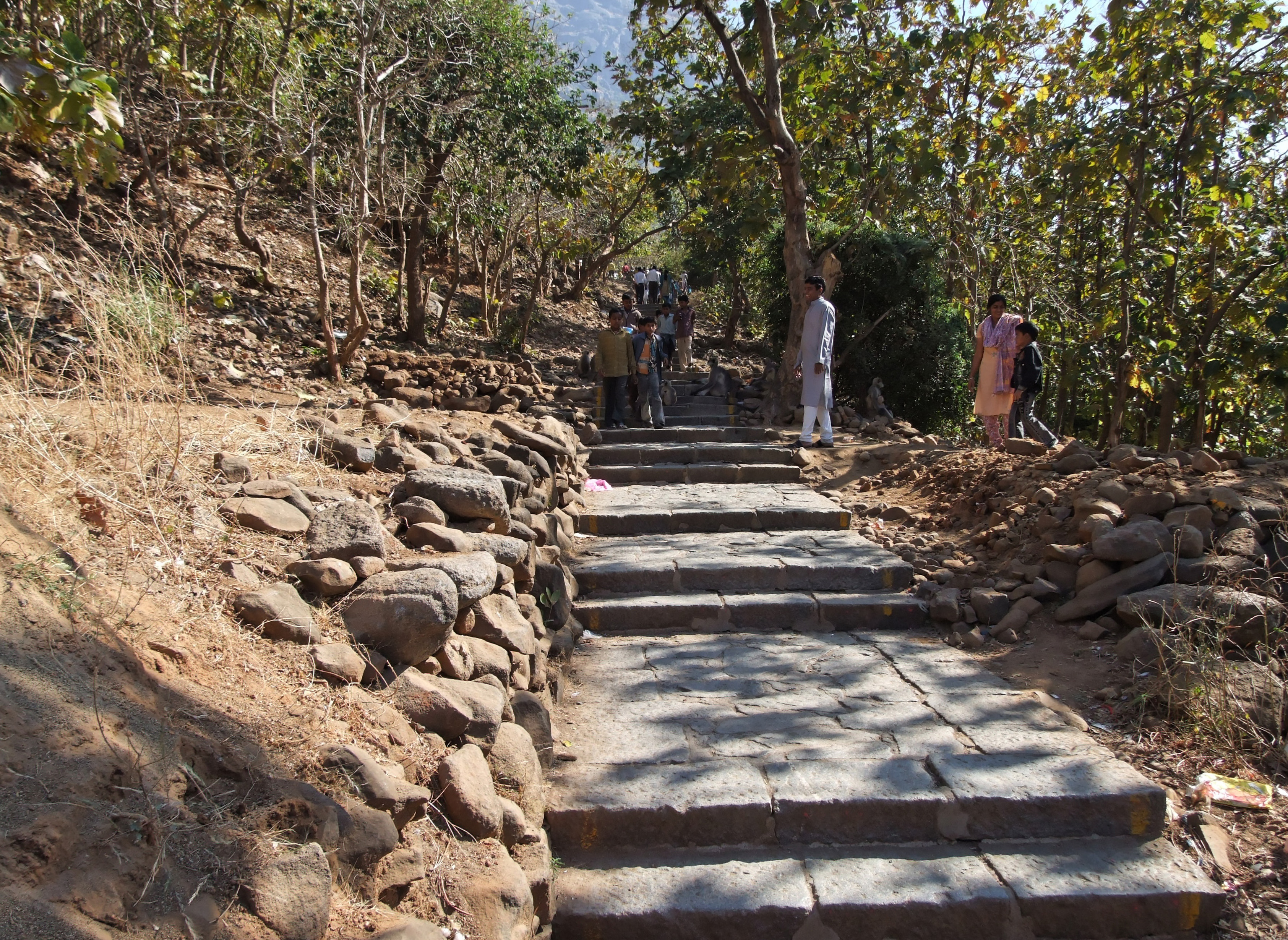 Junagah - Girnar, Gujarat - India